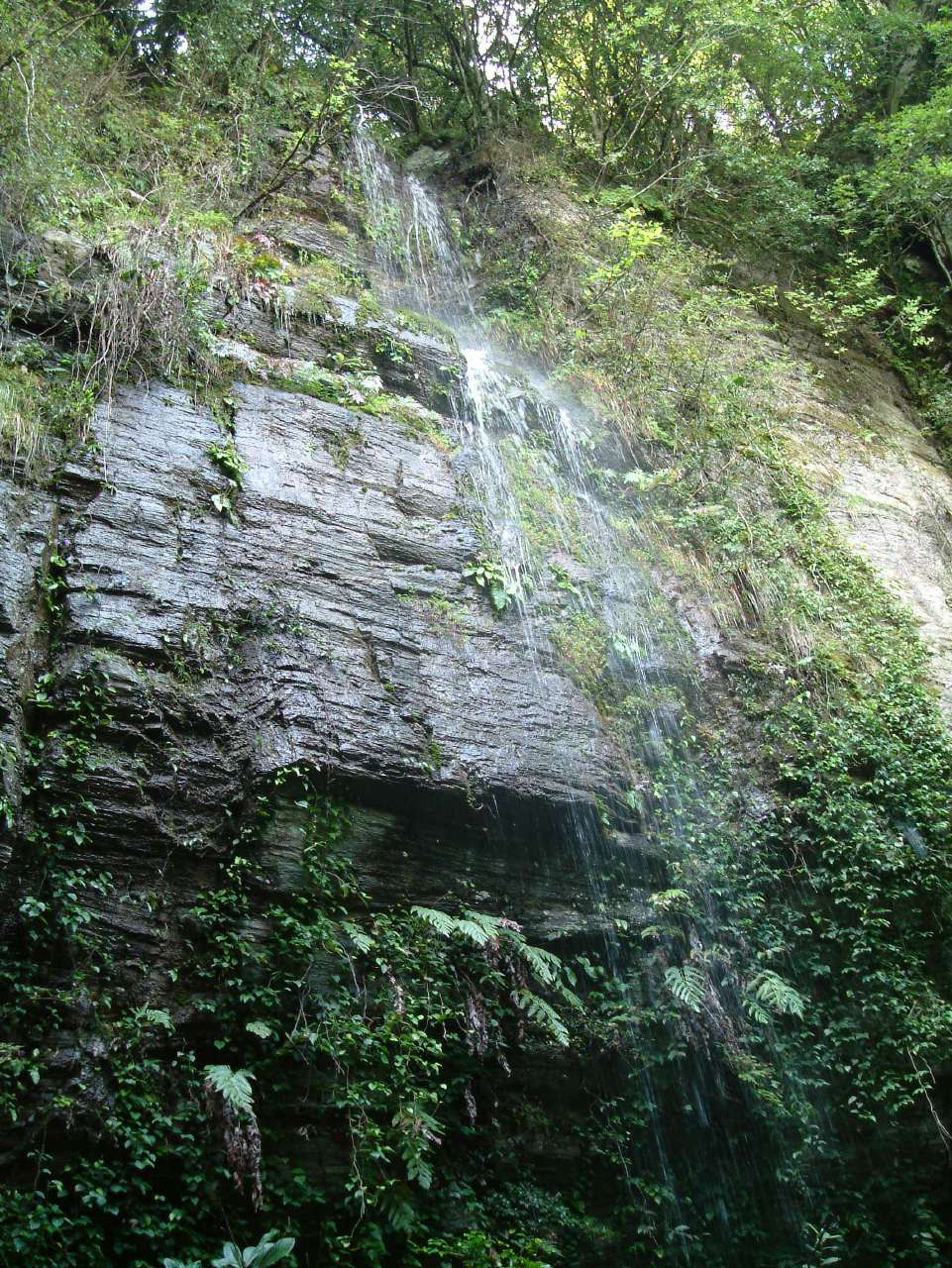 建治寺の行場の建治の滝